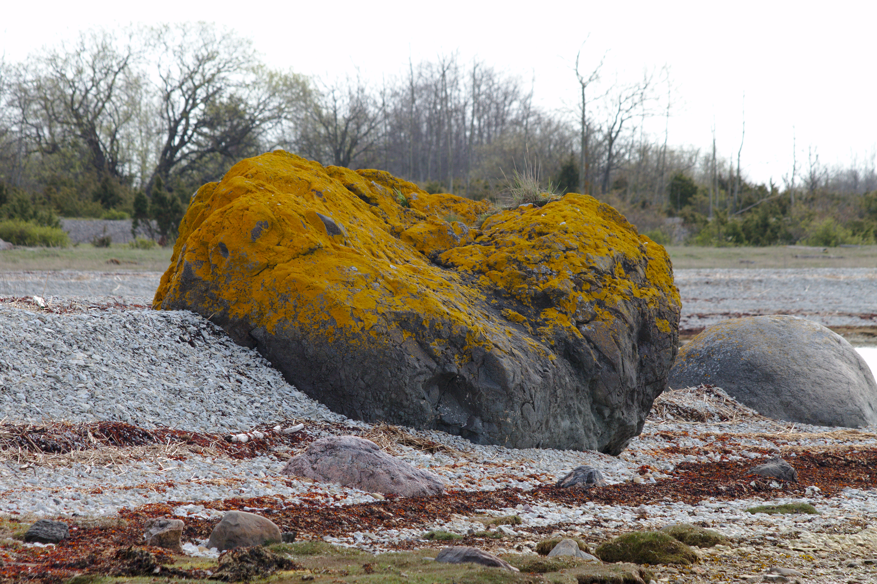 Osmussaare I rahnuderühm. Suurim gneissbretša Osmussaare I rahnuderühmas